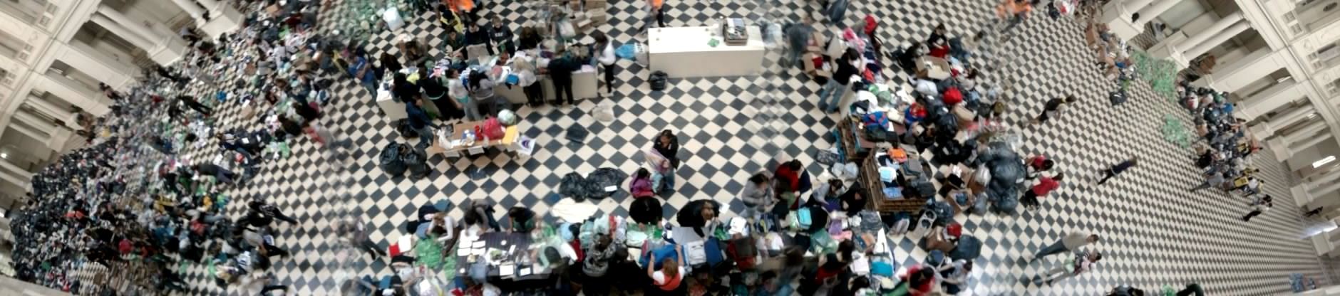 Inundaciones en La Plata, Argentina. Centro de concentración y distribución de donaciones de la Municipalidad de La Plata, en el Pasaje Dardo Rocha.